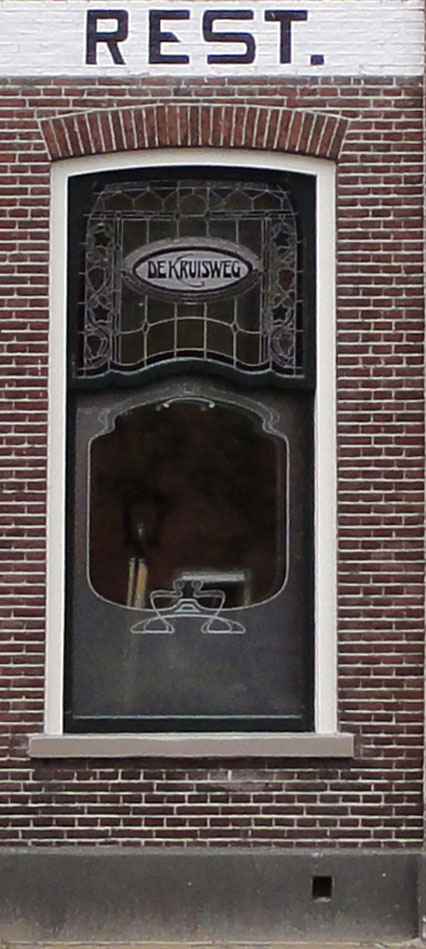 Hoofdweg 42 Damwoude